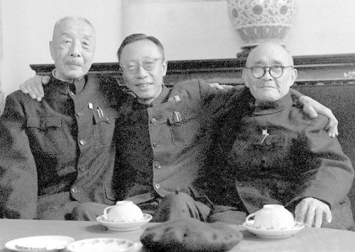 1961年在纪念辛亥革命50周年大会期间，鹿钟麟、溥仪、熊秉坤的合影。自左至右：鹿钟麟、溥仪、熊秉坤。